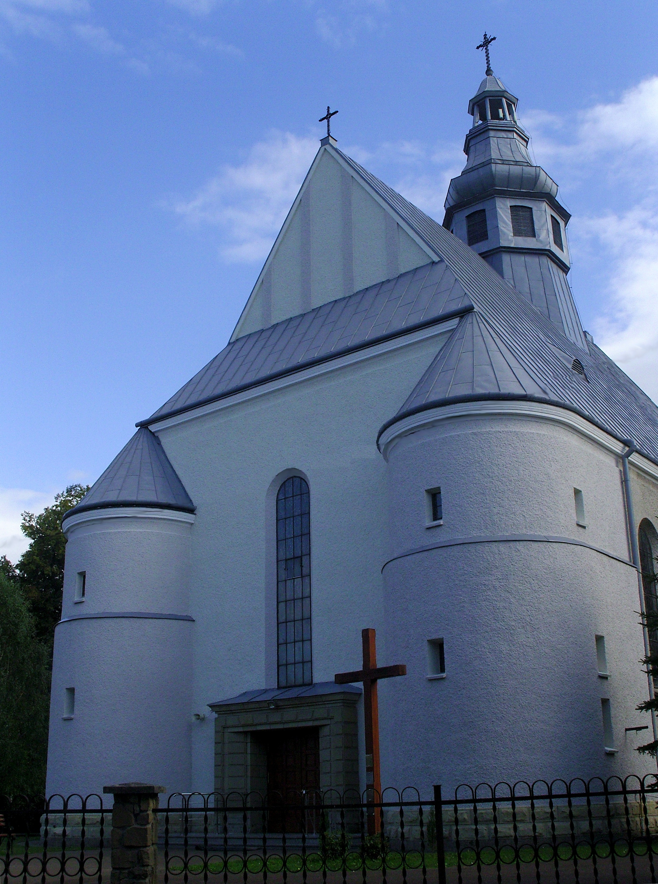 Fasada kościoła parafialnego Imienia Maryi w Bączalu Dolnym, diecezja rzeszowska